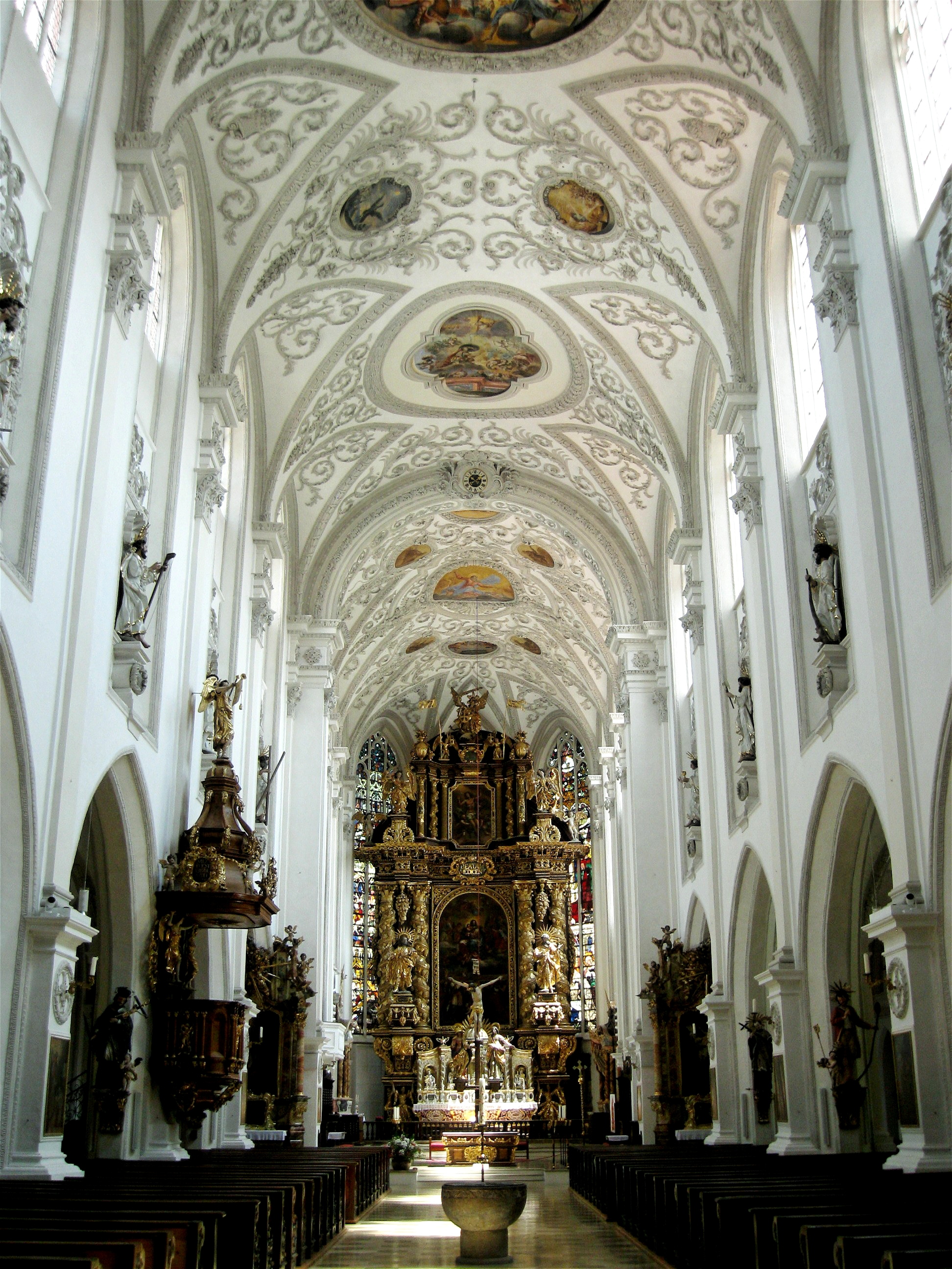 Georg-Hellmair-Platz 1; Mariae Himmelfahrt, Katholische Stadtpfarrkirche, stattliche dreischiffige Pfeilerbasilika mit Polygonalchor, Langhausflankenturm und zwei Vorhallen im Nord- und Südwesten, nach Plänen Matthäus Ensingers unter Mitwirkung von Valentin Kindlin und Veit Maurer, 1458-88, Barockisierung 1680-1710; mit Ausstattung.